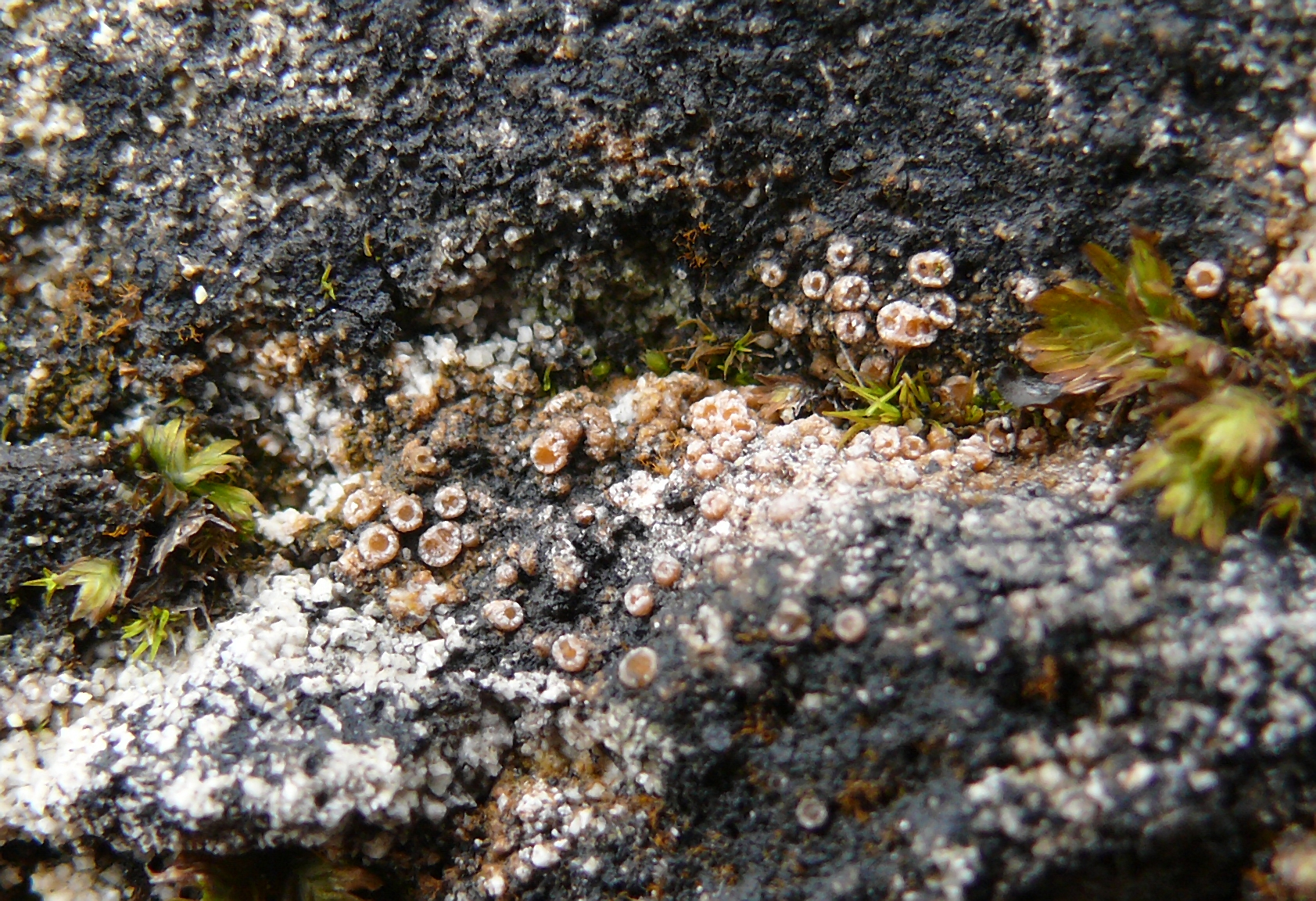 Gyalecta jenensis, Schwäbische Alb, Germany